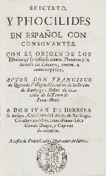 Portada de la traducción de Epicteto de Quevedo